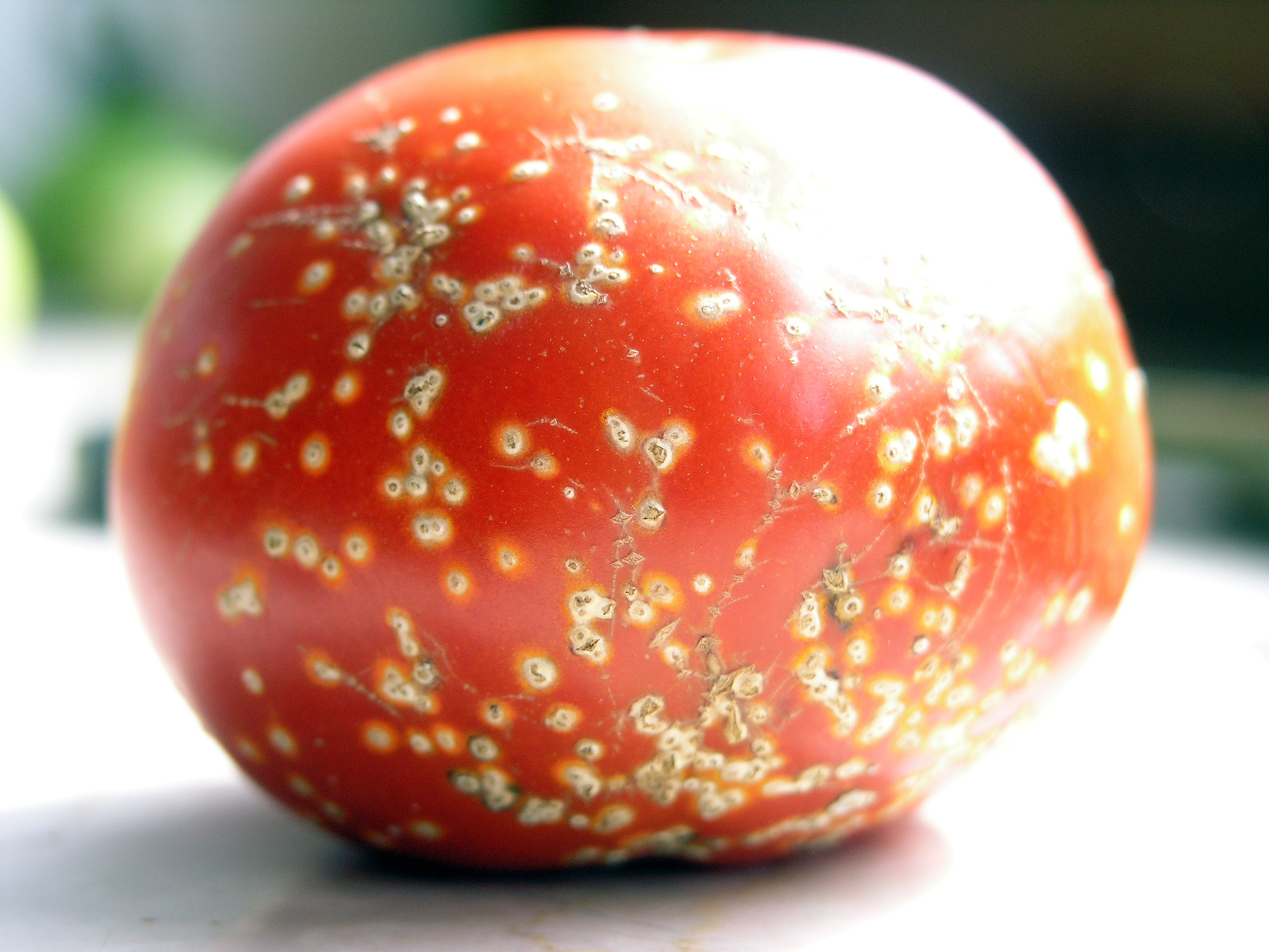 Tomate Frucht Vogelaugen von Corynebacterium michiganense